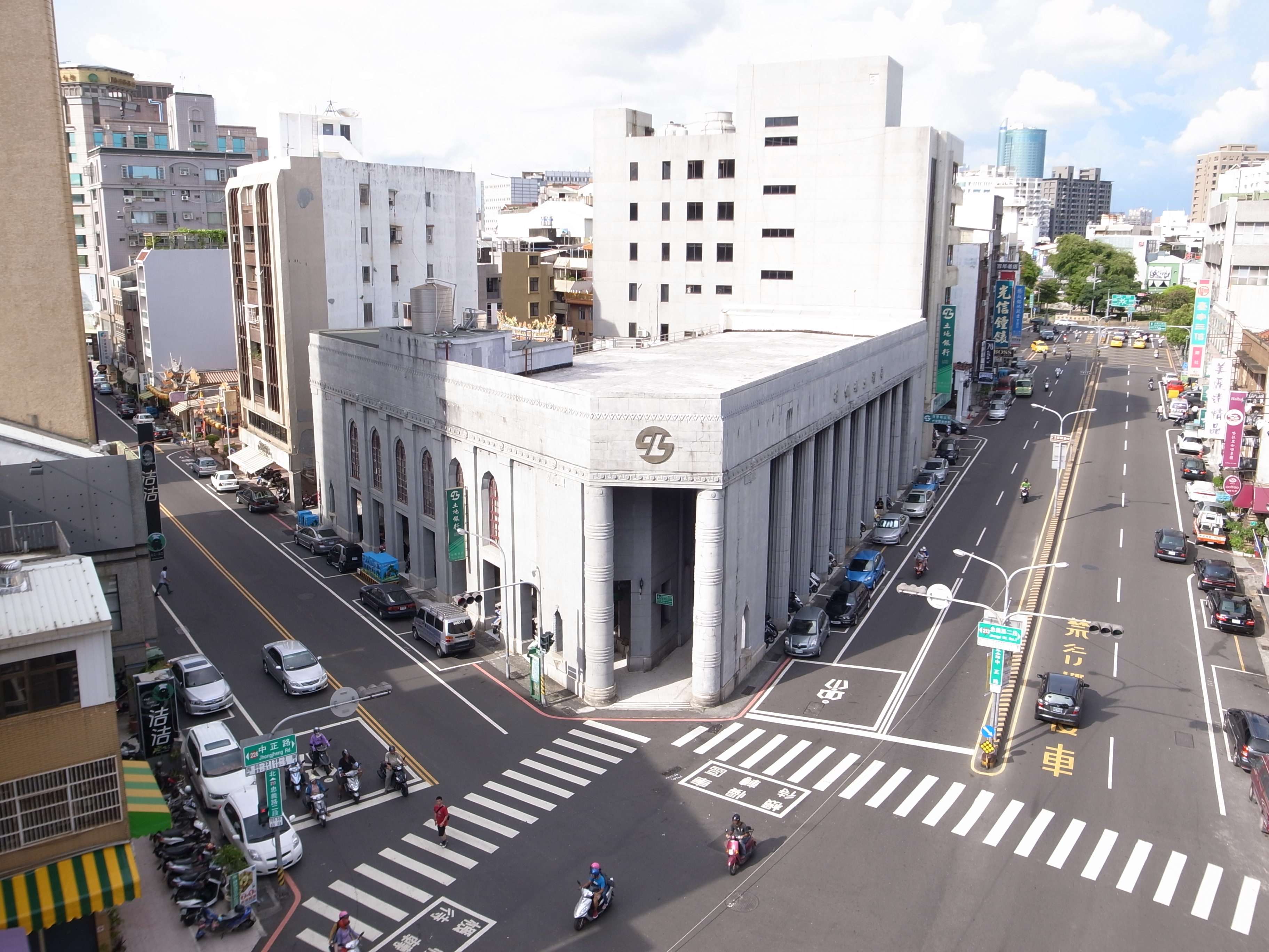 從林百貨頂樓拍攝原日本勸業銀行臺南支店（今臺灣土地銀行臺南分行）。